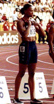 Semifinal de 100 m en el Campeonato del Mundo de Sevilla 99, con Marion Jones.